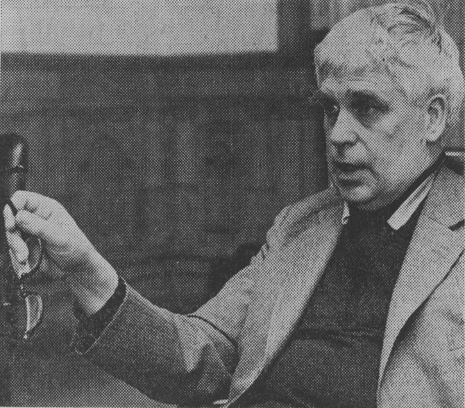 Arkitekten Per-Olof Olsson